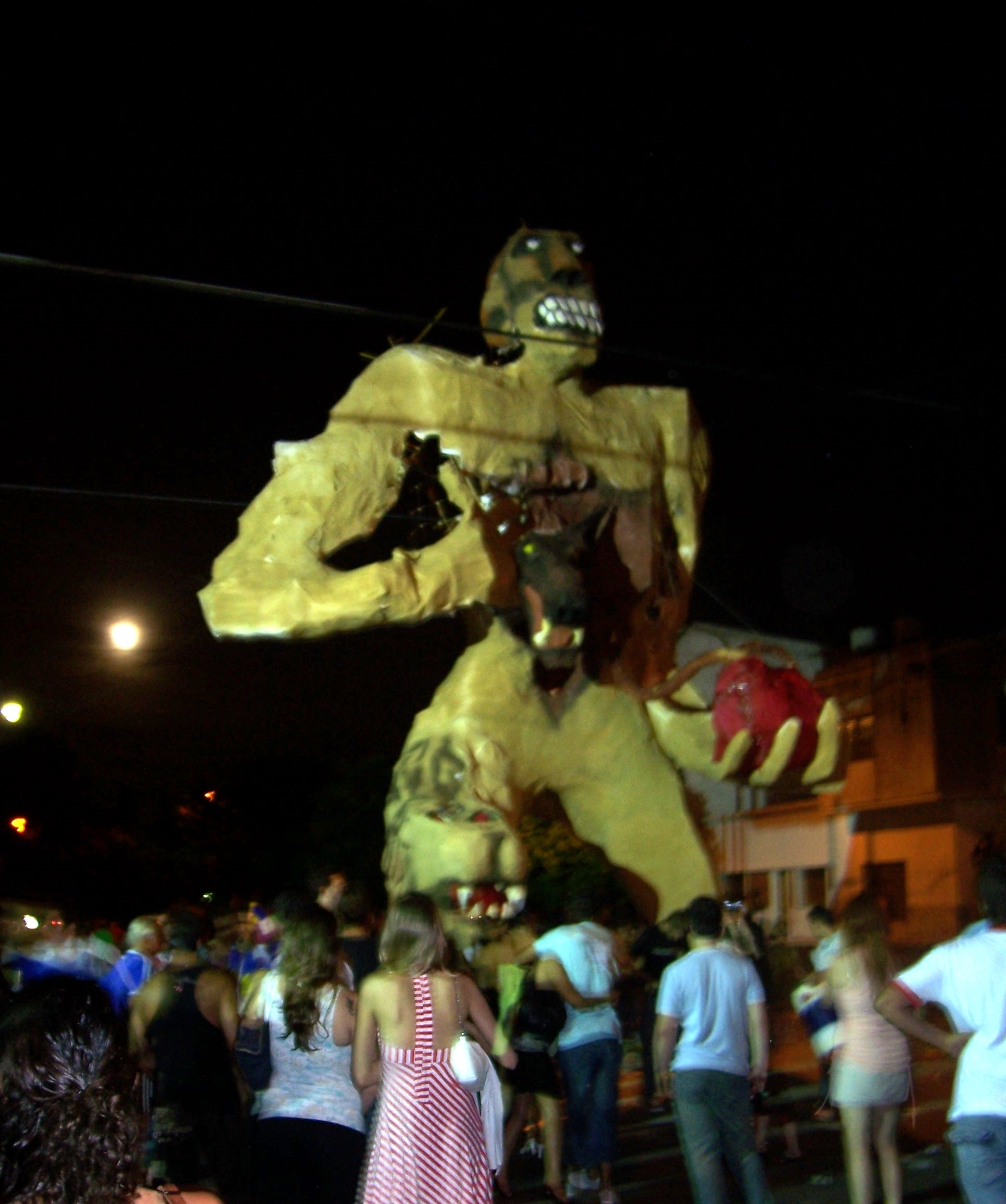 Tradicional quema del muñeco en la ciudad de La Plata. Imagen del muñeco antes de la quema.